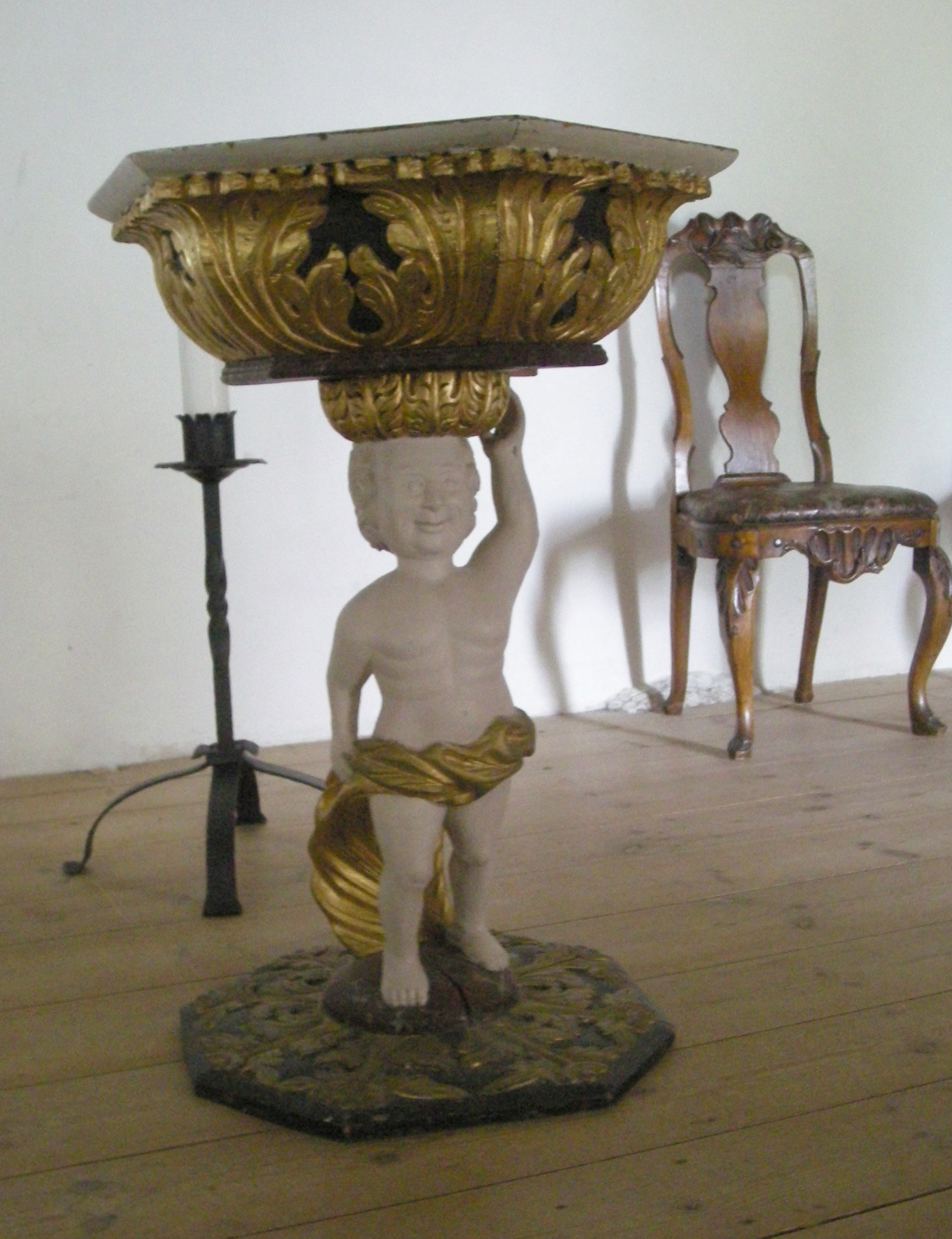 Døpefont (Erik Kolstrup, 1719) i Stange kirke